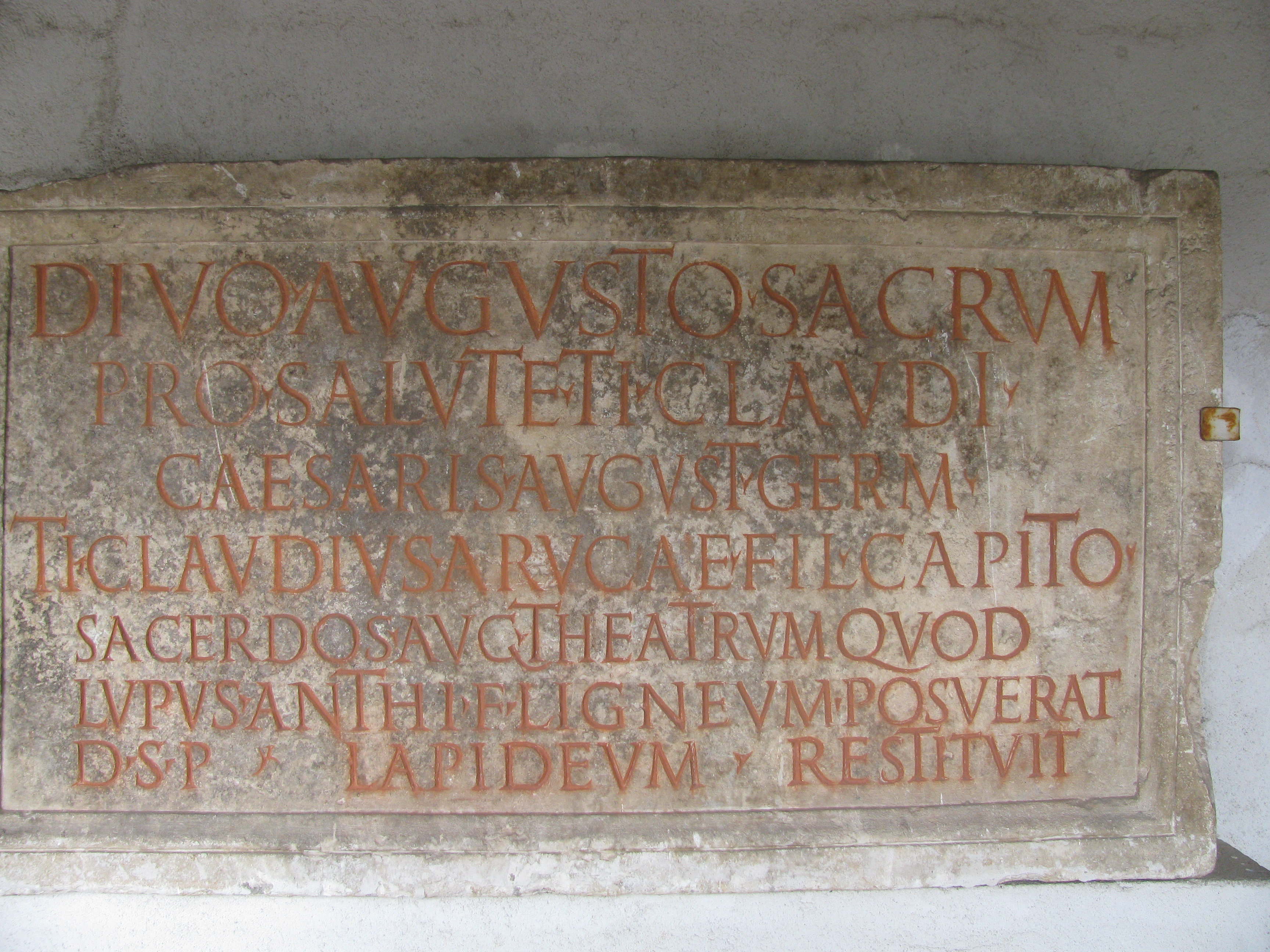 Divo Augusto sacrum / pro salute Ti(beri) Claudi / Caesaris August(i) Germ(anici) / Ti(berius) Claudius Arucae fil(ius) Capito / sacerdos Aug(usti) theatrum quod / Lupus Anthi f(ilius) ligneum posuerat / d(e) s(ua) p(ecunia) lapideum restituit